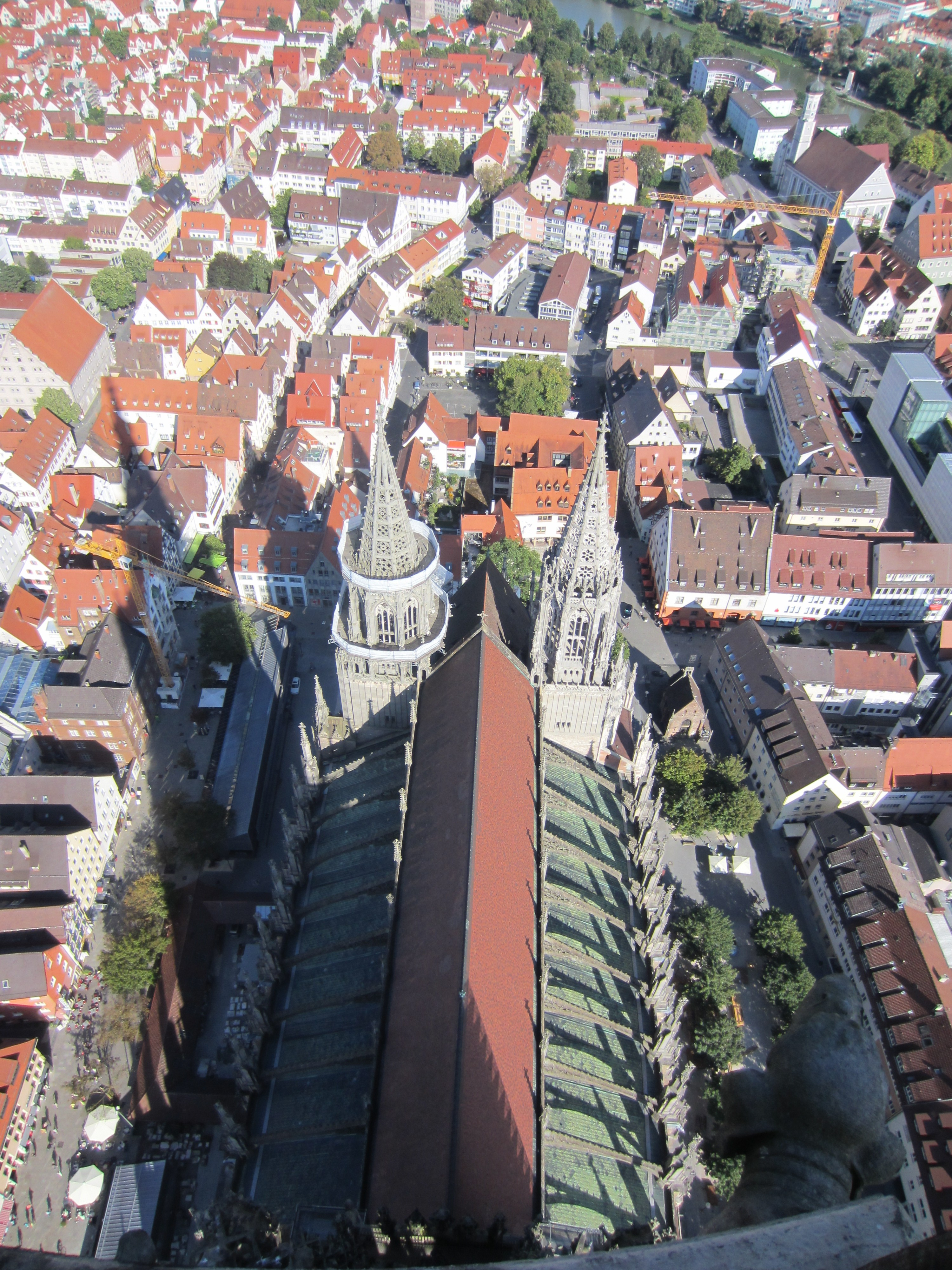 La ciudad de Ulm desde la torre de la Catedral.